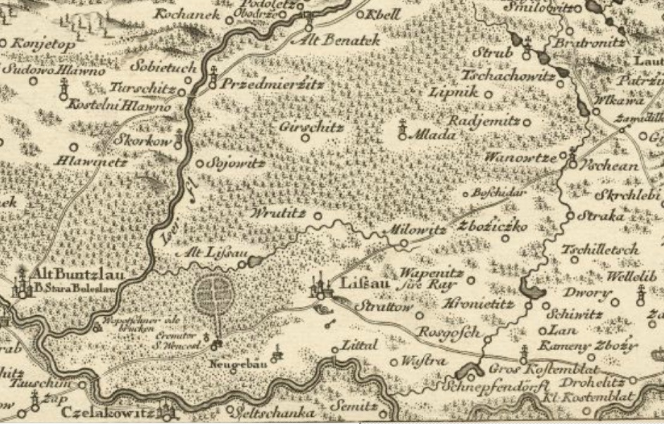 Detail Müllerovy mapy Čech z roku 1720 Řeky Vlkava a Minařice